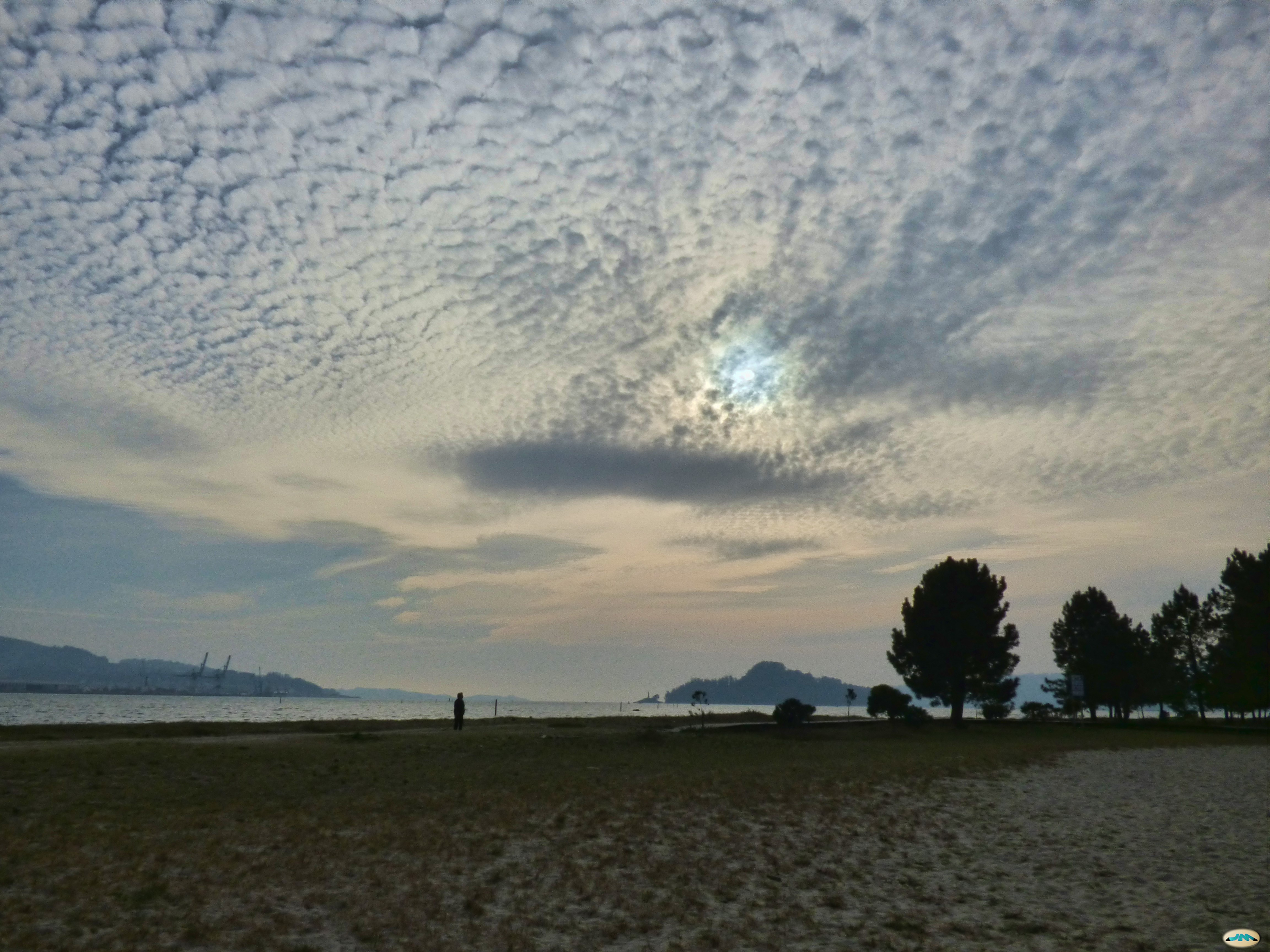 Para un martes de nubes